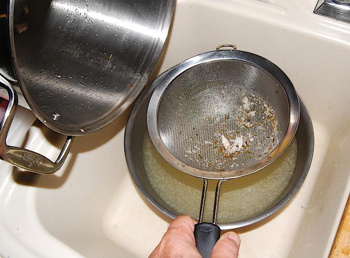 Durchseihen einer Hühnerbrühe (nach Entnahme des gekochten Hühnerfleisches) durch ein Küchensieb, um die Brühe von Fleisch- und Knochenresten etc. zu reinigen.